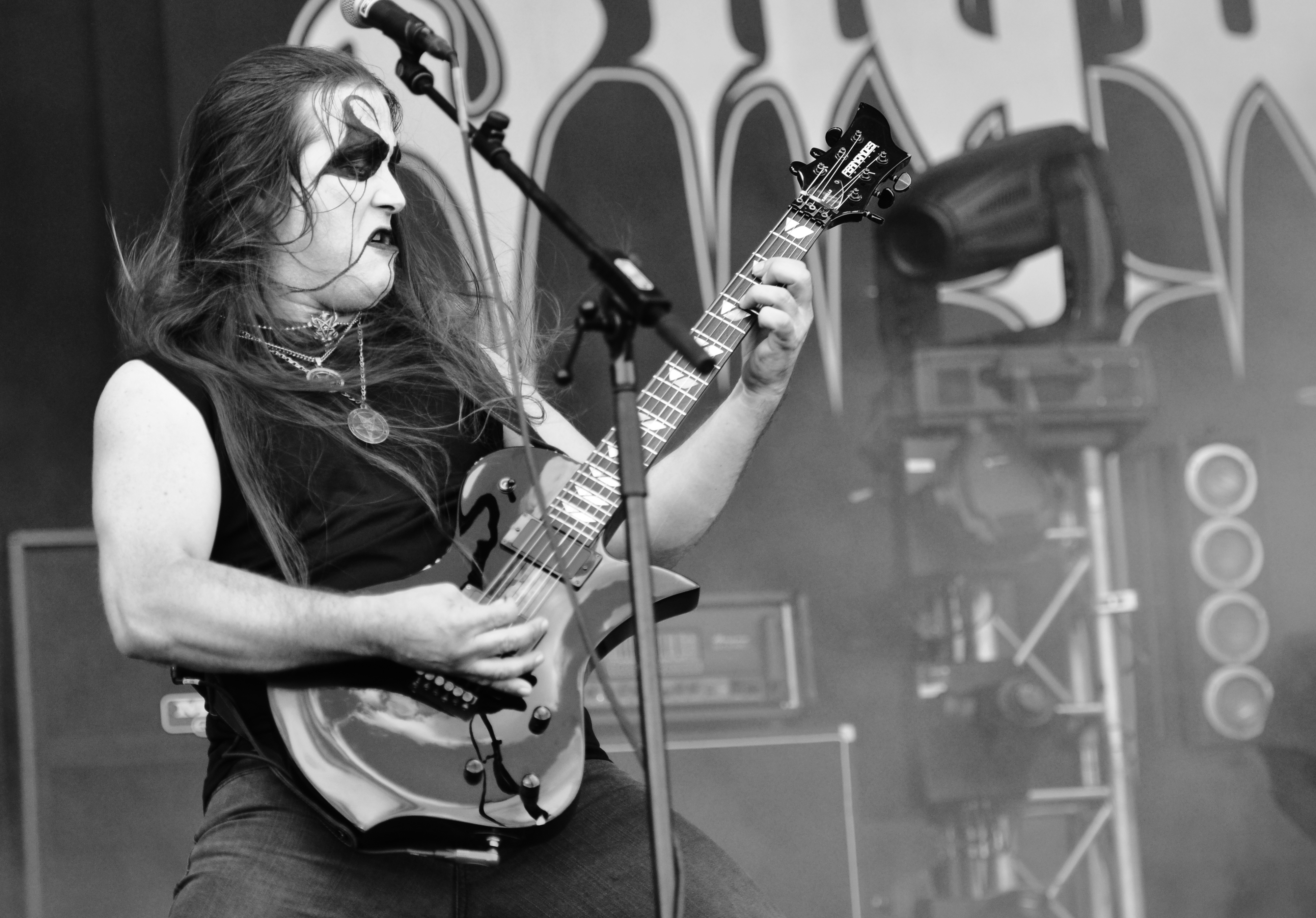 Dagon, Party.San Open Air 2014